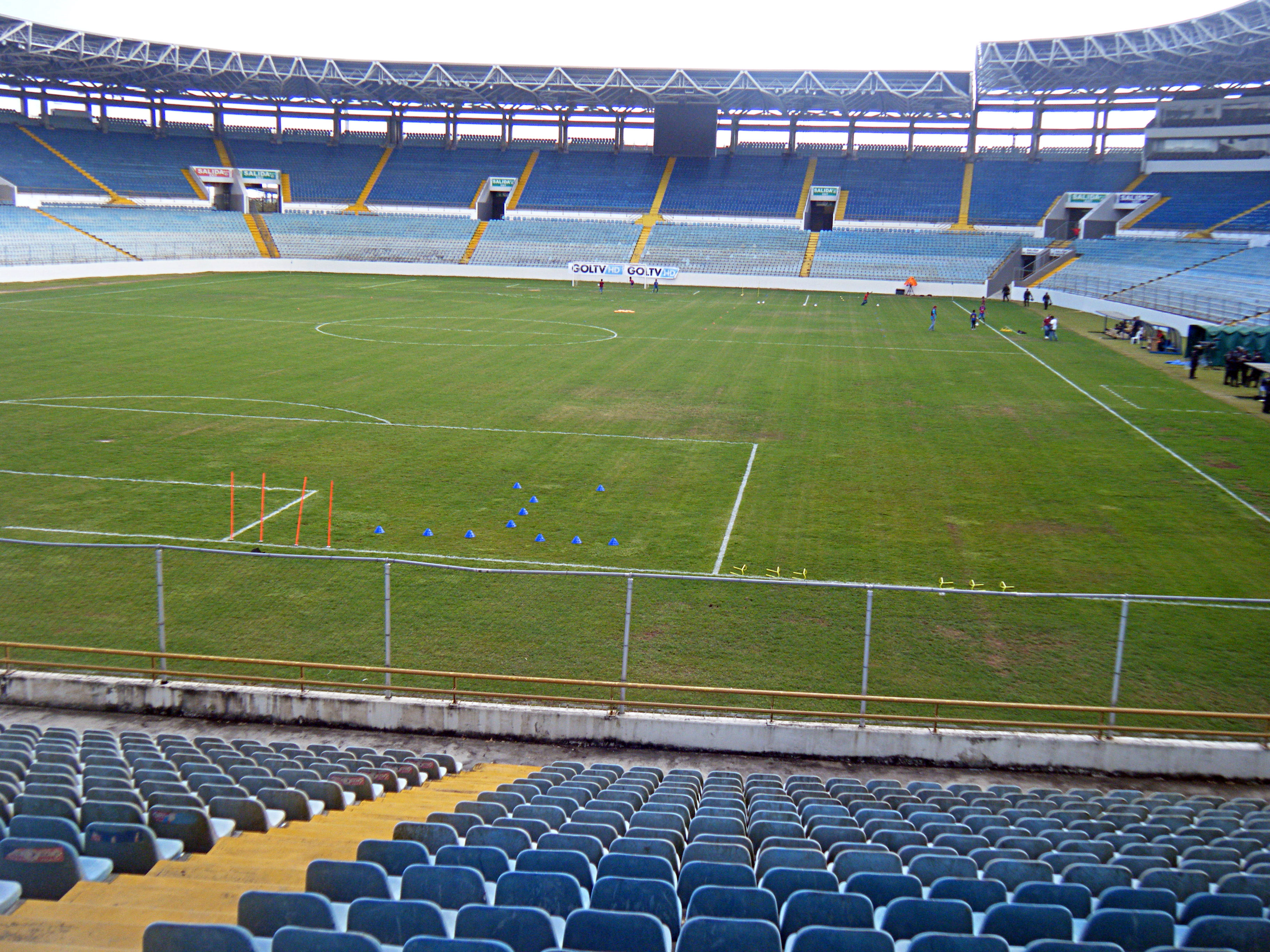 Encuentro entre el Monagas SC y Estudiantes de Caracas el 21 de febrero de 2016 en el Monumental de Maturín.